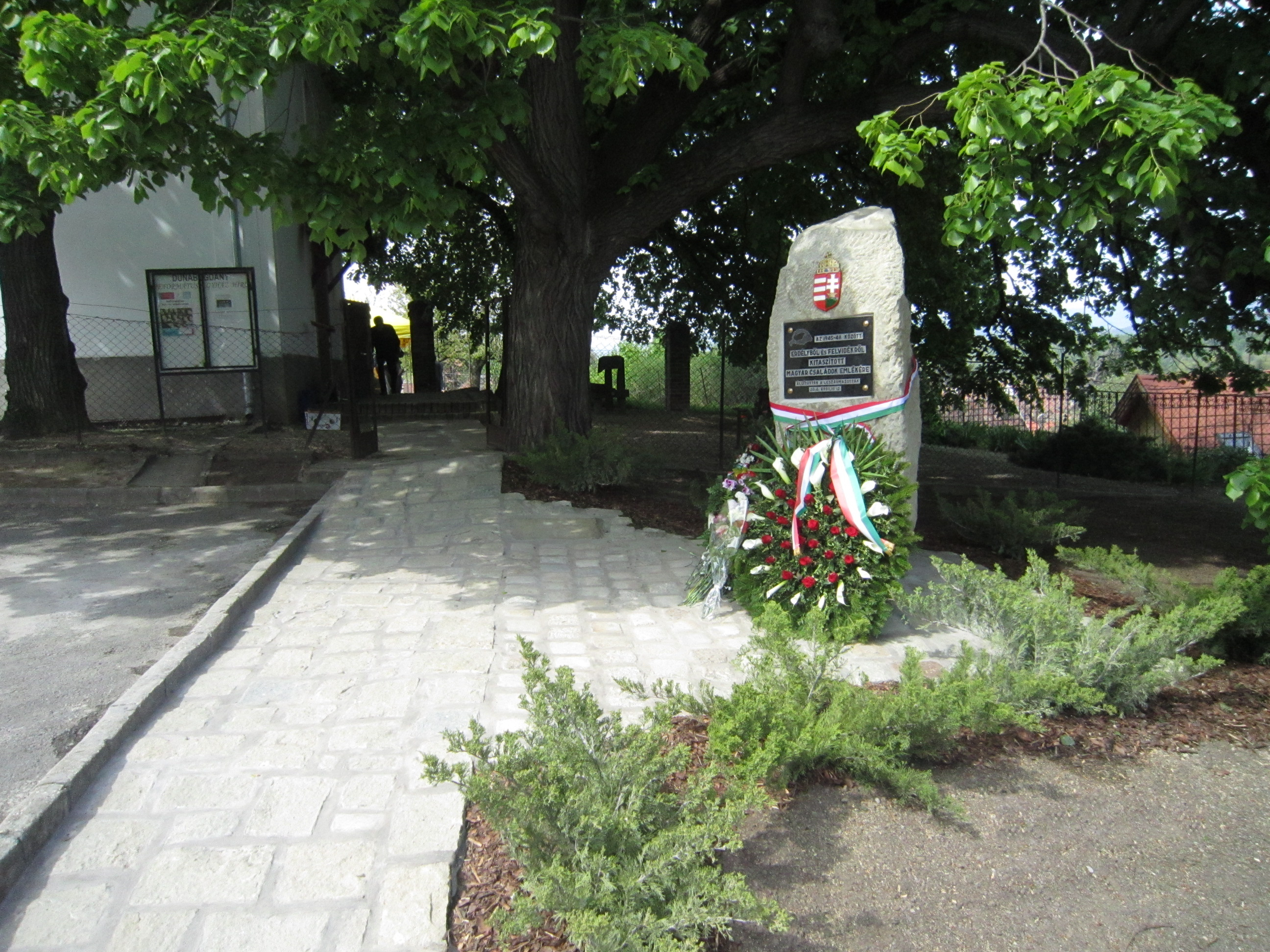 1945-48 között Erdélyből és Felvidékről elűzött, és Dunabogdányba került magyar családok emlékműve